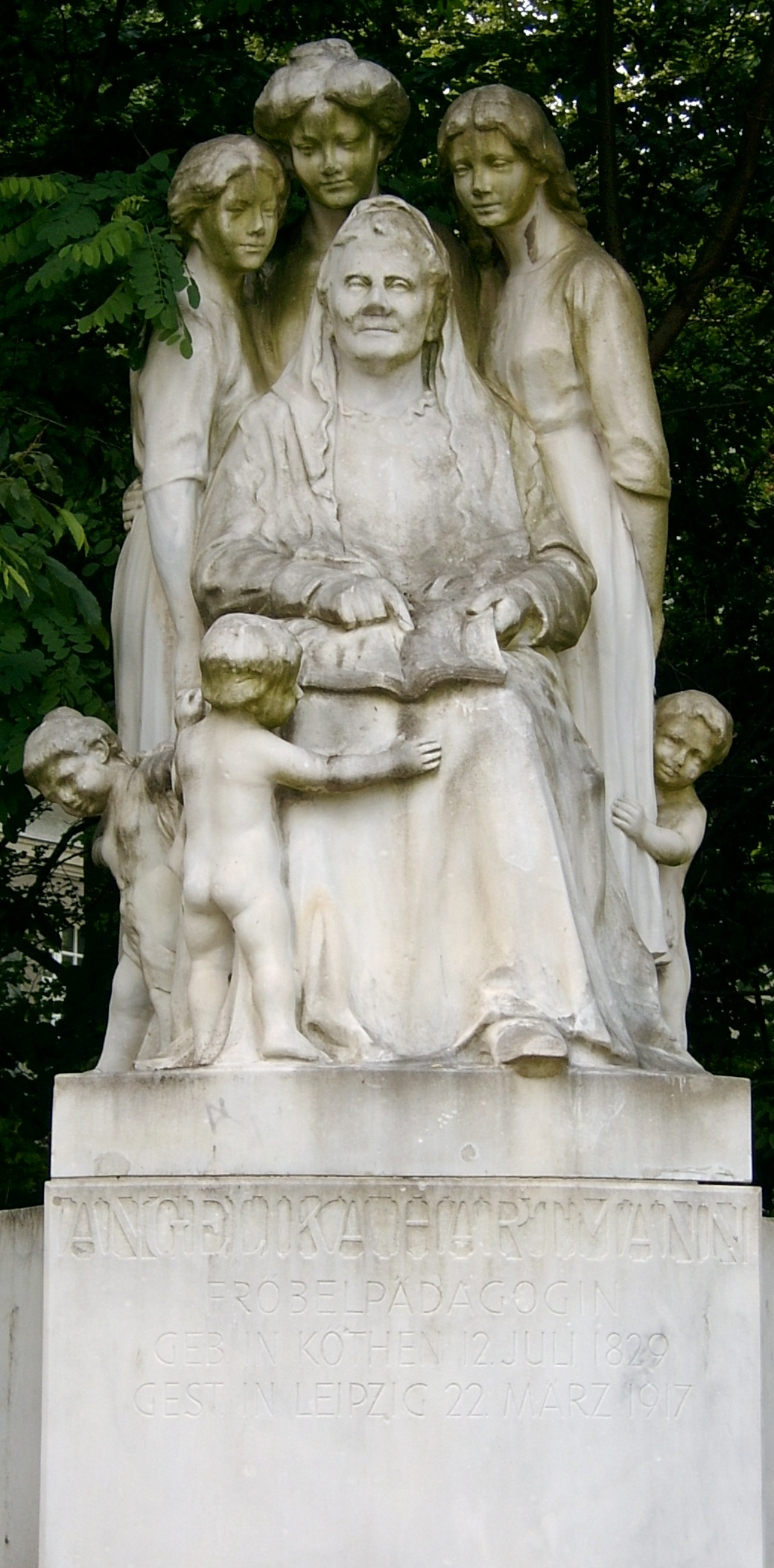 Denkmal für Angelika Hartmann in Köthen (Anhalt). Inschrift im Sockel: "Angelika Hartmann Frobelpädagogin Geb. in Köthen 12. Juni 1829 Gest. in Leipzig 22. März 1917.